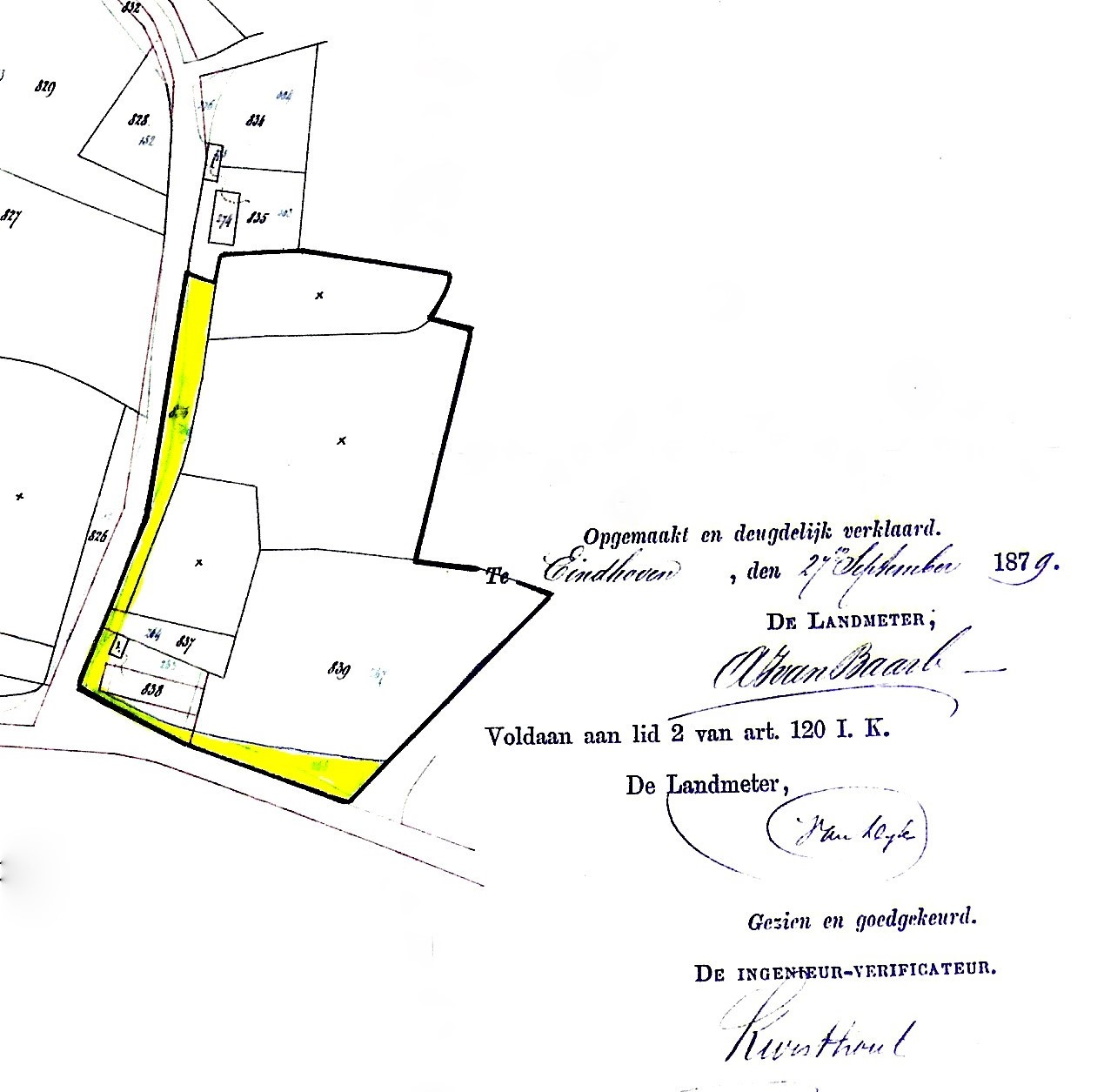 Stroken grond naast de Plashoeve waarop het voorpootrecht rustte.